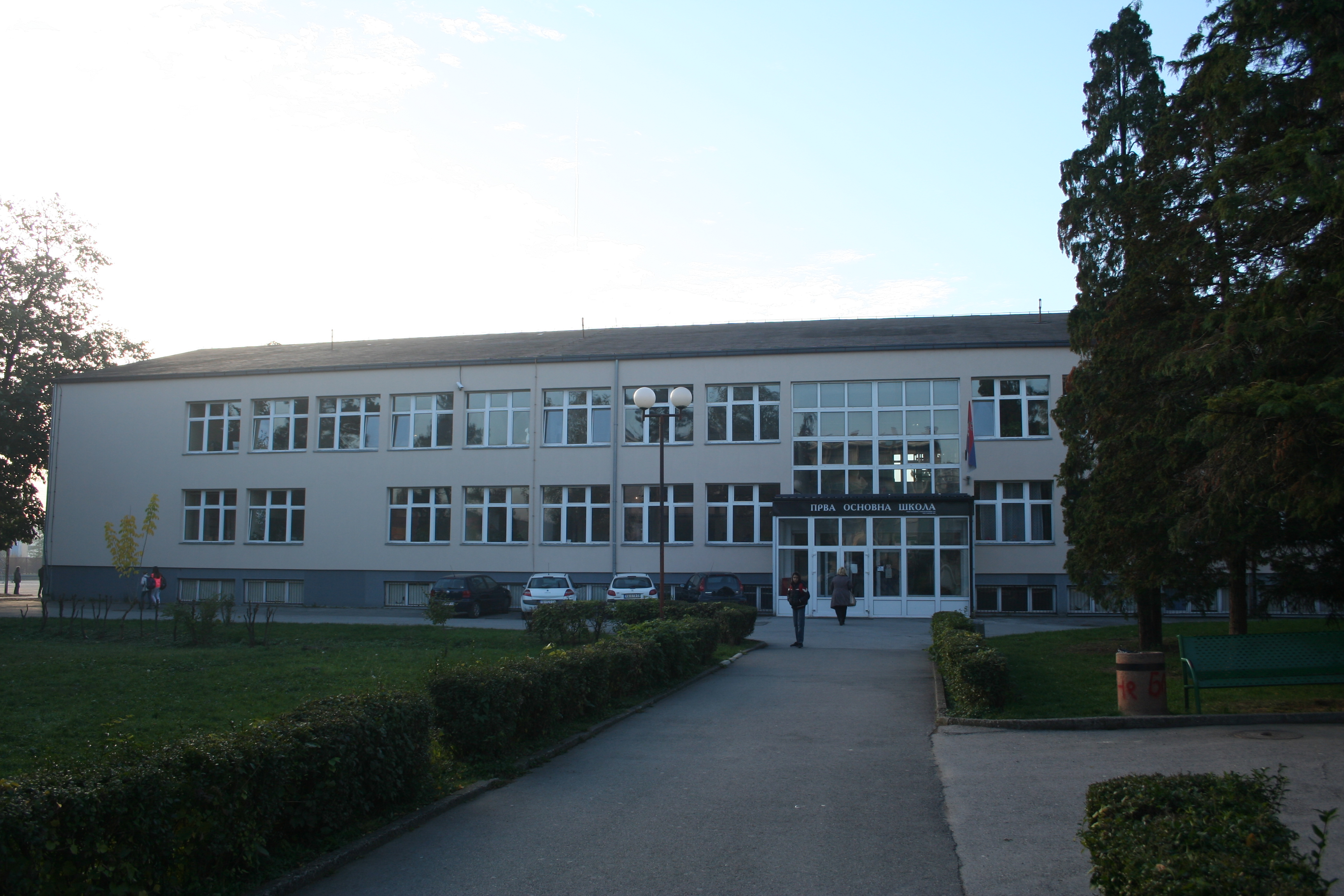 Prva osnovna škola Valjevo